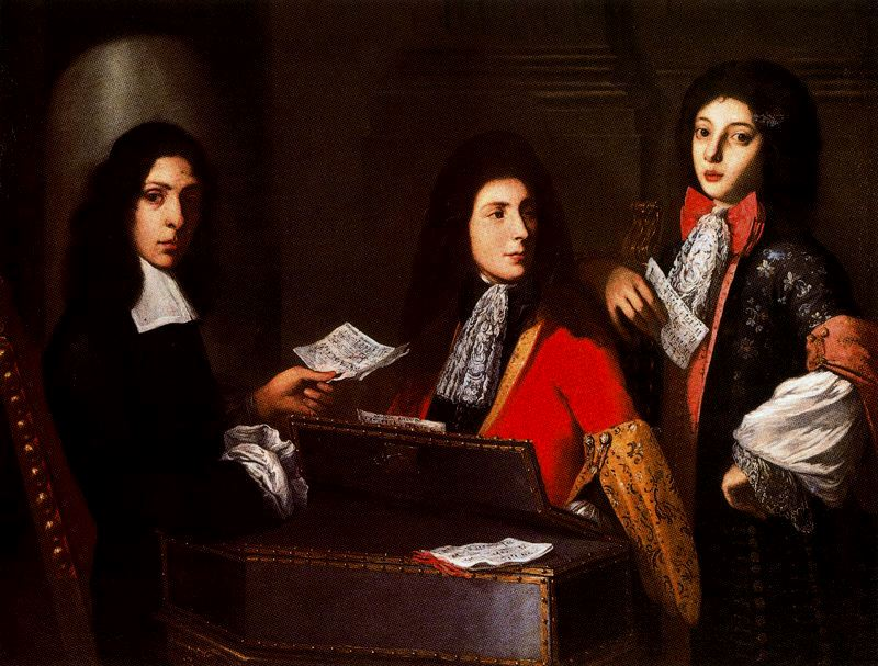 Retrato de tres músicos de la corte de los Medicis, Palazzo Pitti